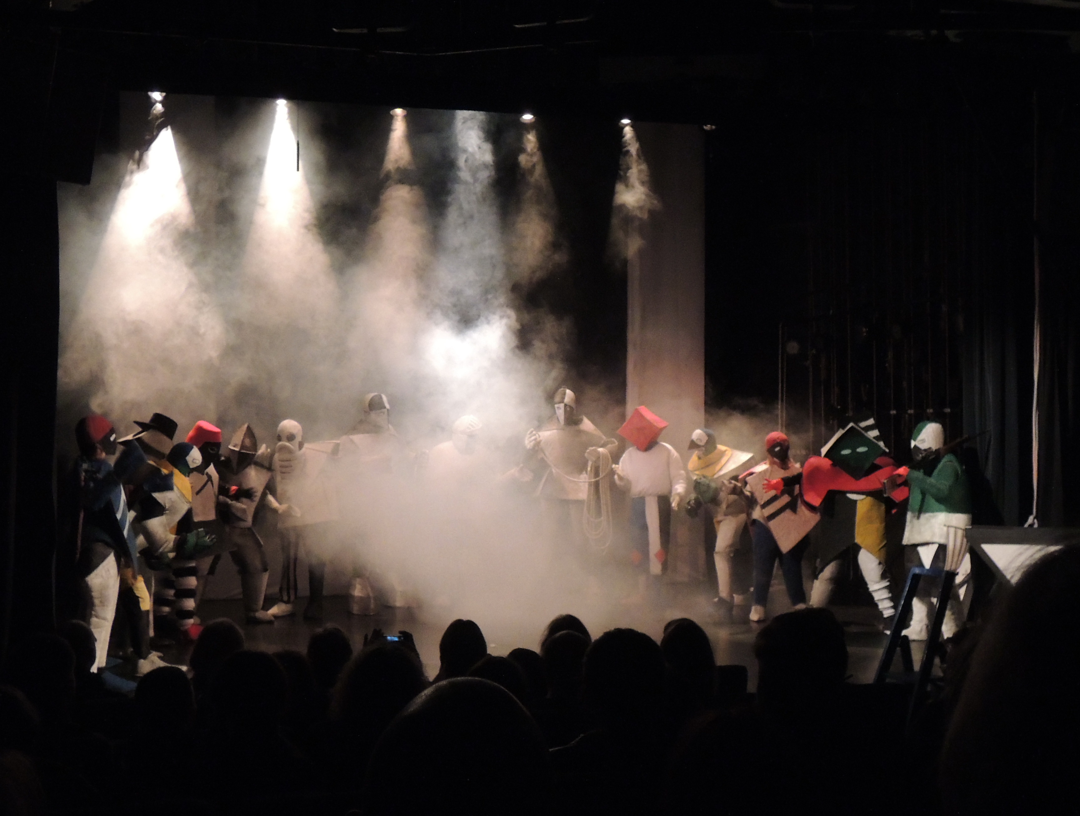 Победа над Солнцем, театр Стаса Намина, 2014